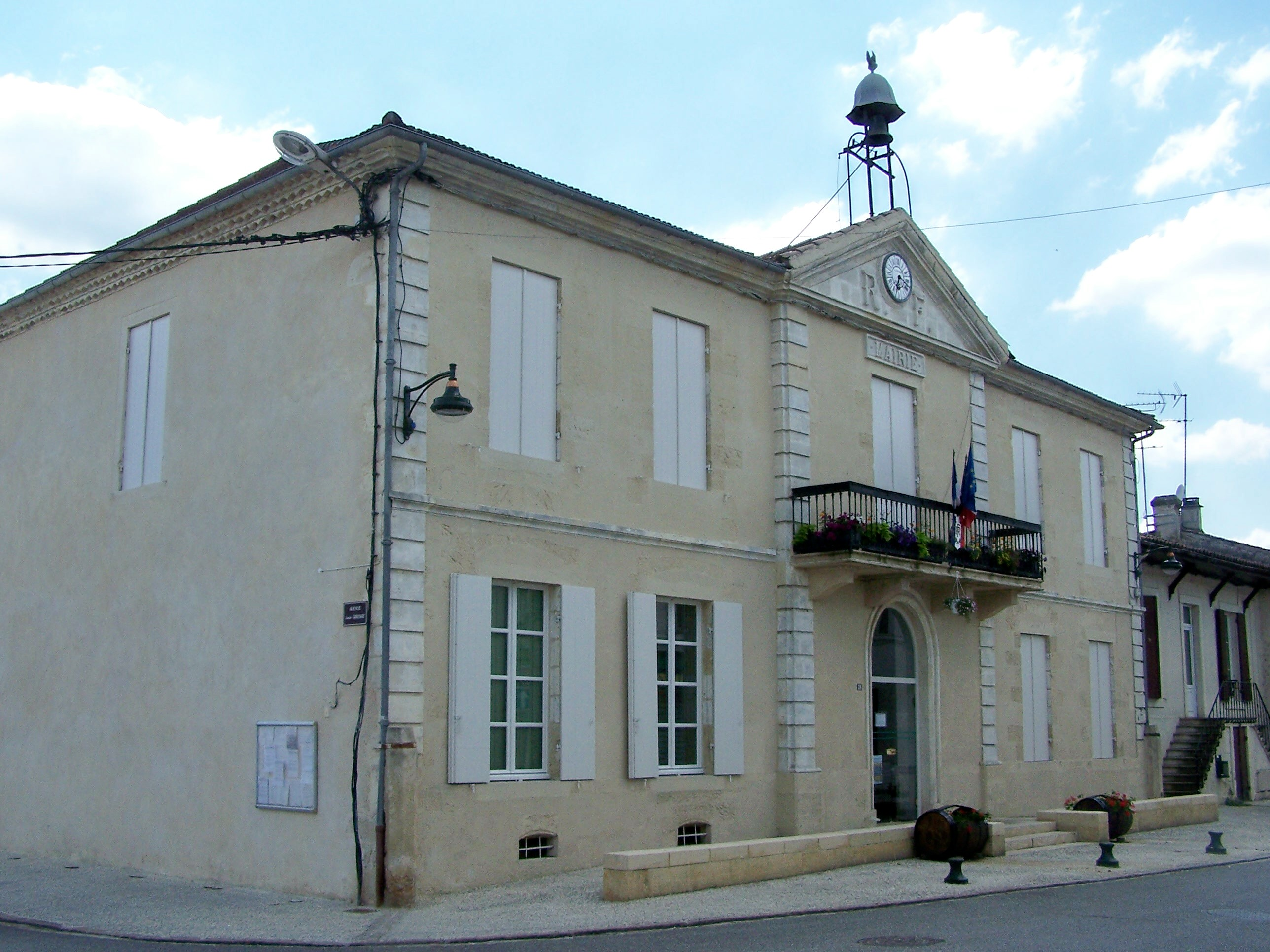 Mairie de Castets-en-Dorthe, Gironde, France